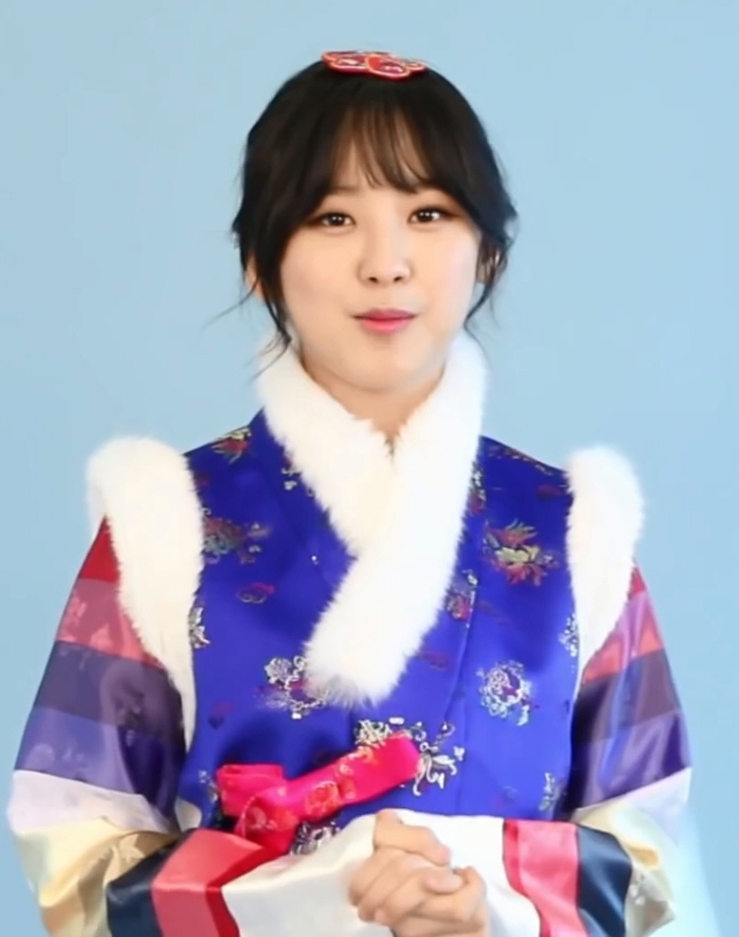 (TV10) 다이아·딘딘·모모랜드·신원호·엔씨아, 스타들의 설 인사 (Feat. 한복 인터뷰)